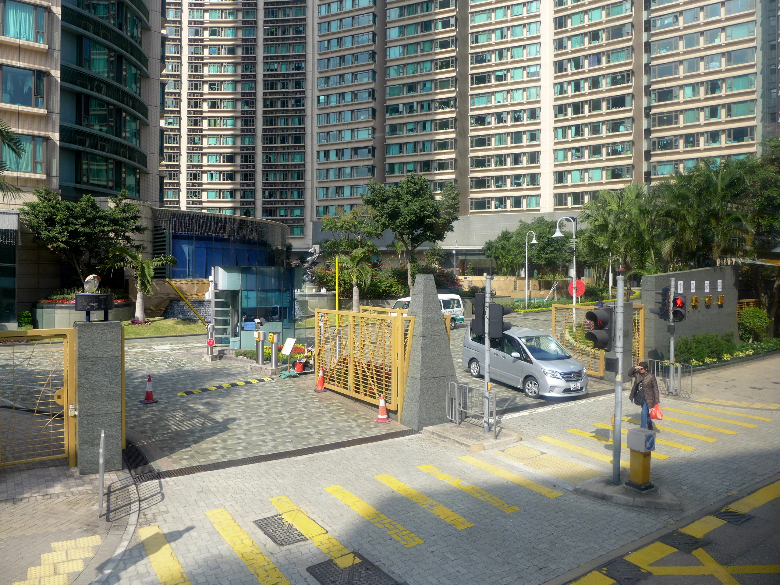 Royal Peninsula Car Entrance